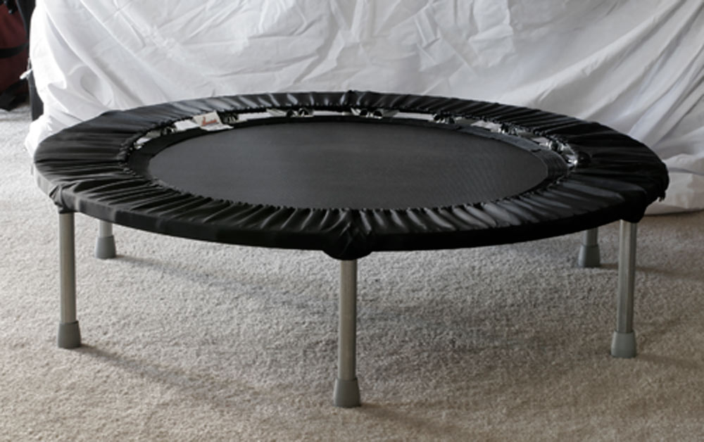 Needak Mini Trampoline